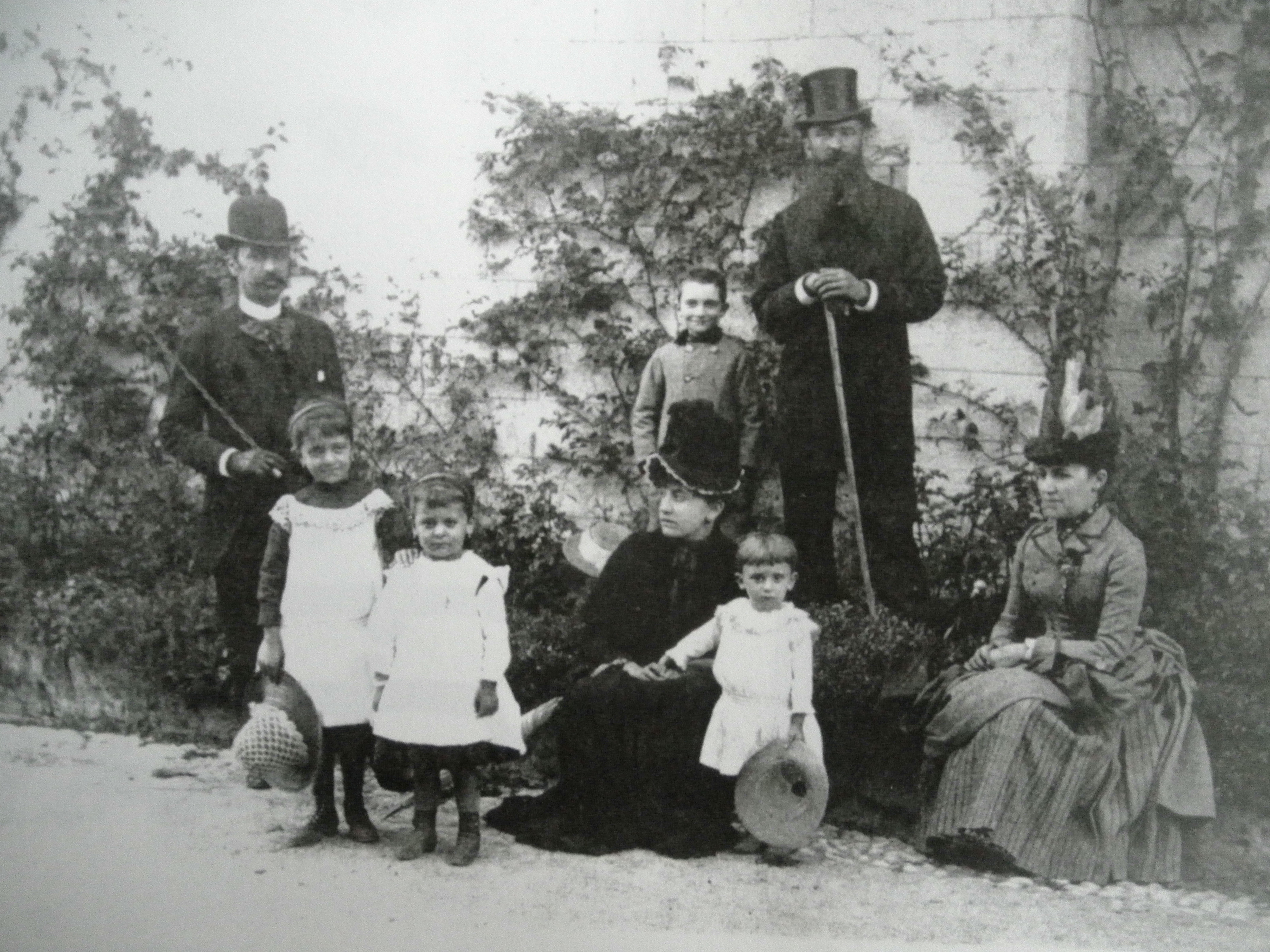 Famille bonnasse2 vers 1887